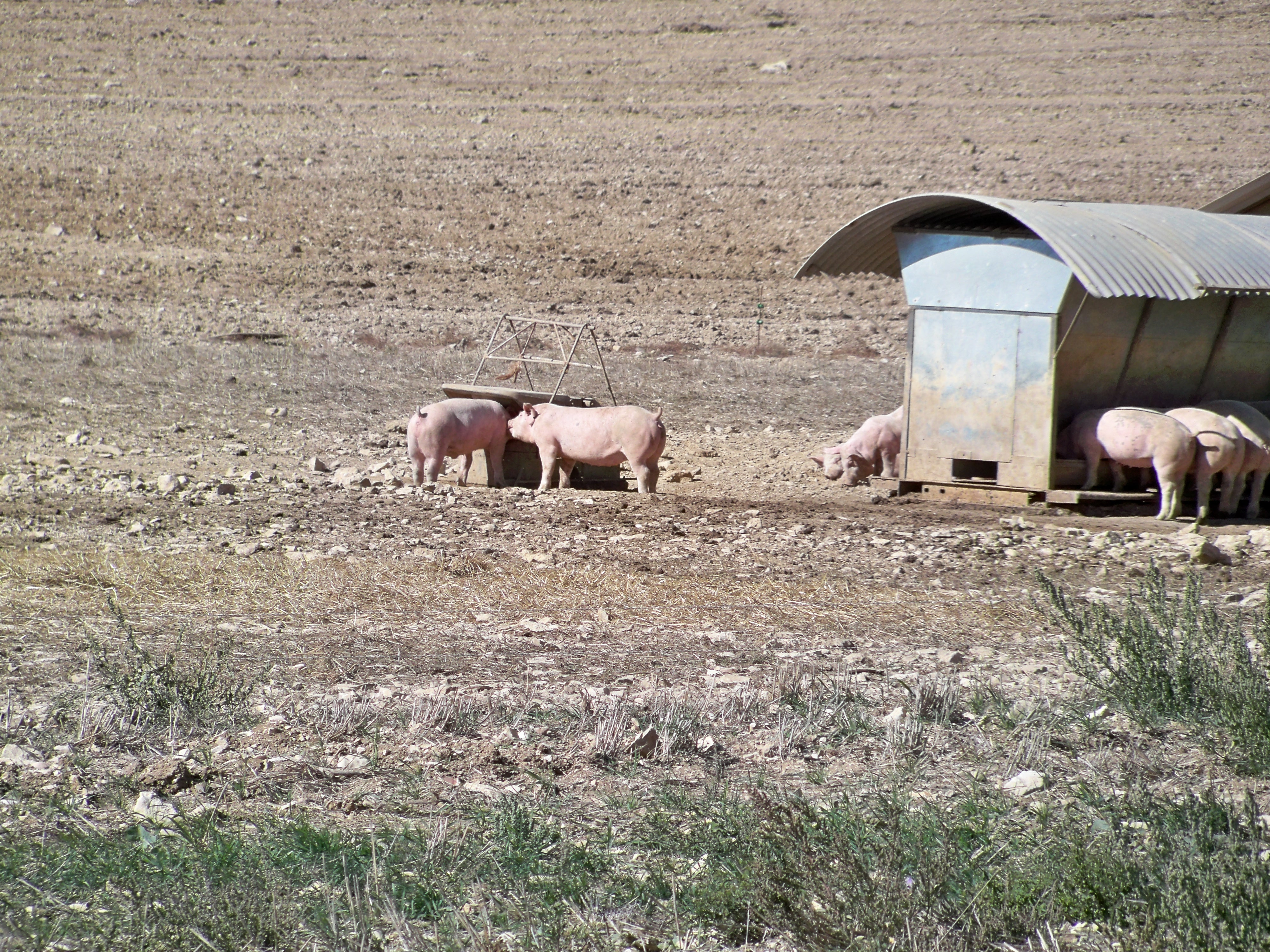 élevage en plein ar de porc du Ventoux